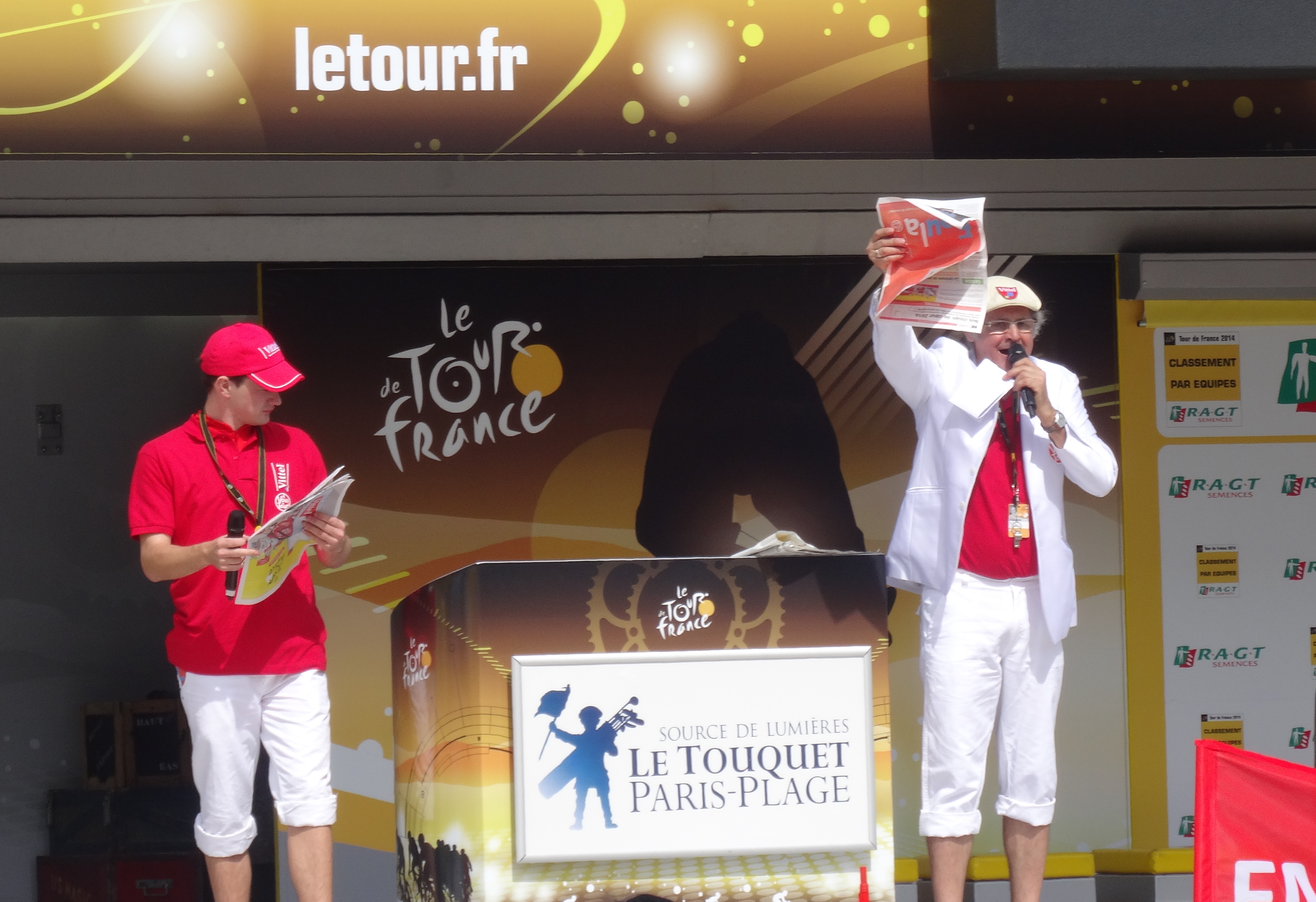 Reportage photographique réalisé le mardi 8 juillet à l'occasion du départ de la quatrième étape du Tour de France 2014 au Touquet-Paris-Plage, Nord-Pas-de-Calais, France.